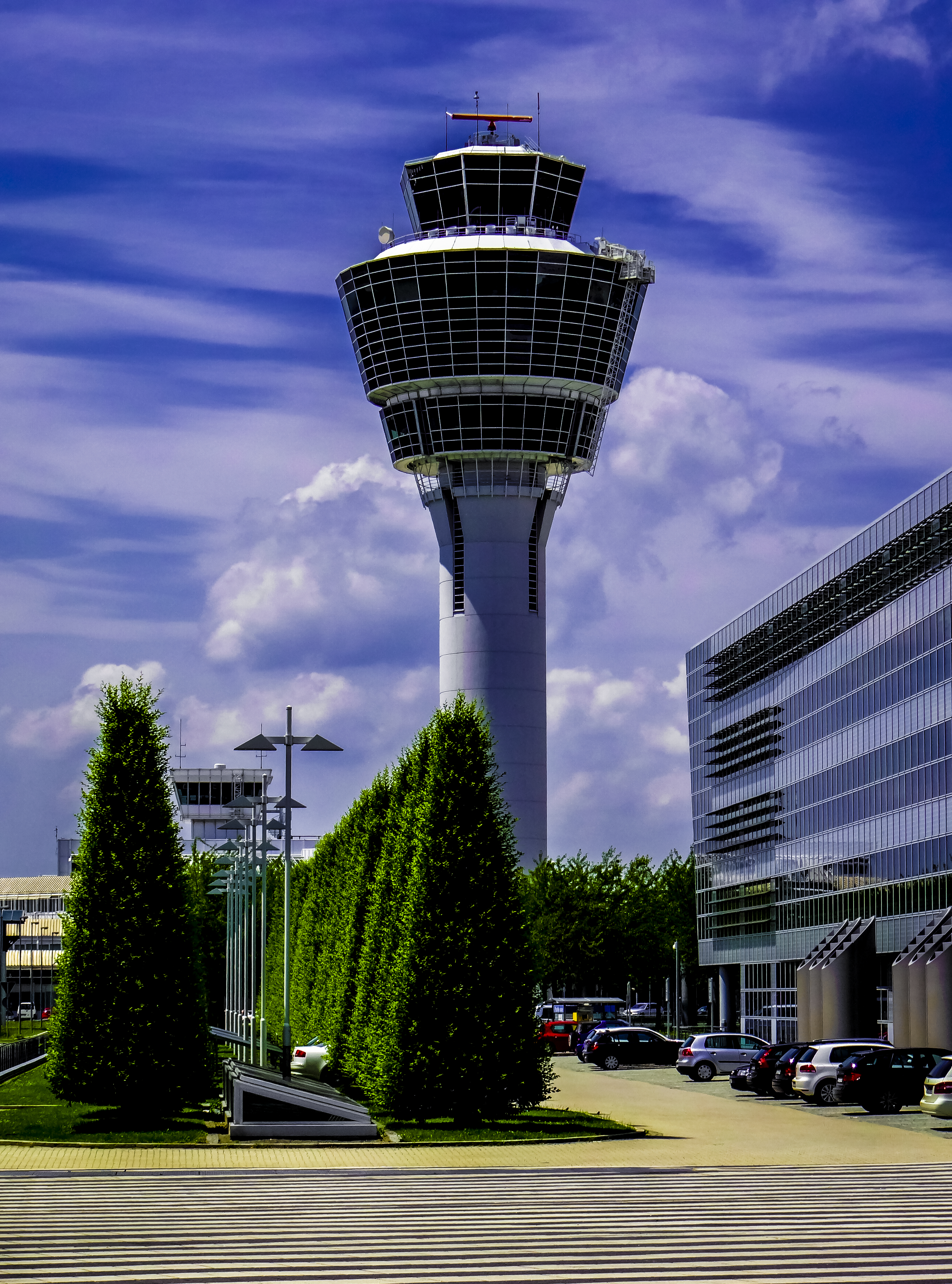 MUC, Franz Josef Strauß Flughafen München im Erdiger Moos.